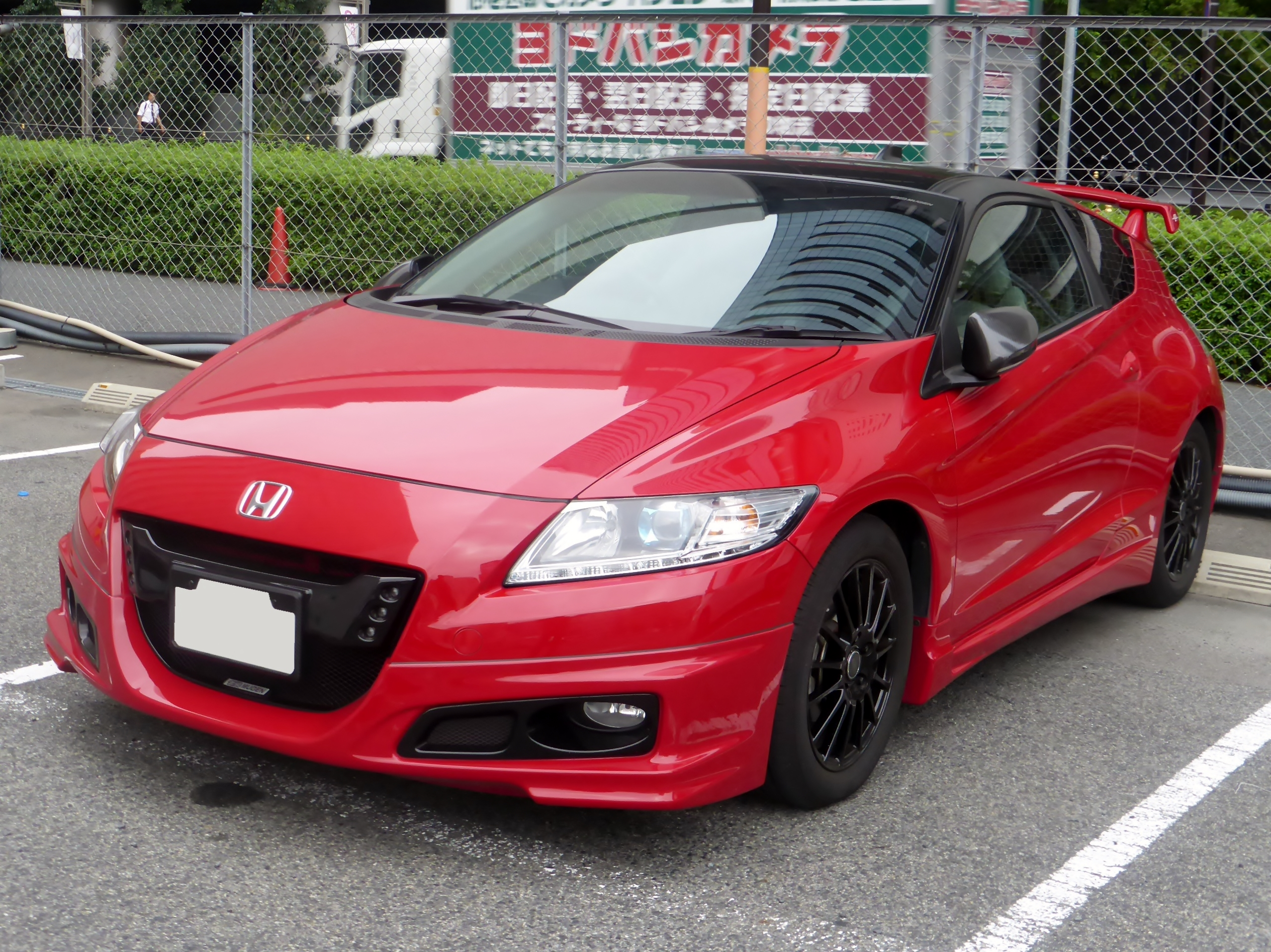 無限パーツを装着したZF2型ホンダ・CR-Z α マスターレーベル2トーンカラースタイルをフロントから撮影。